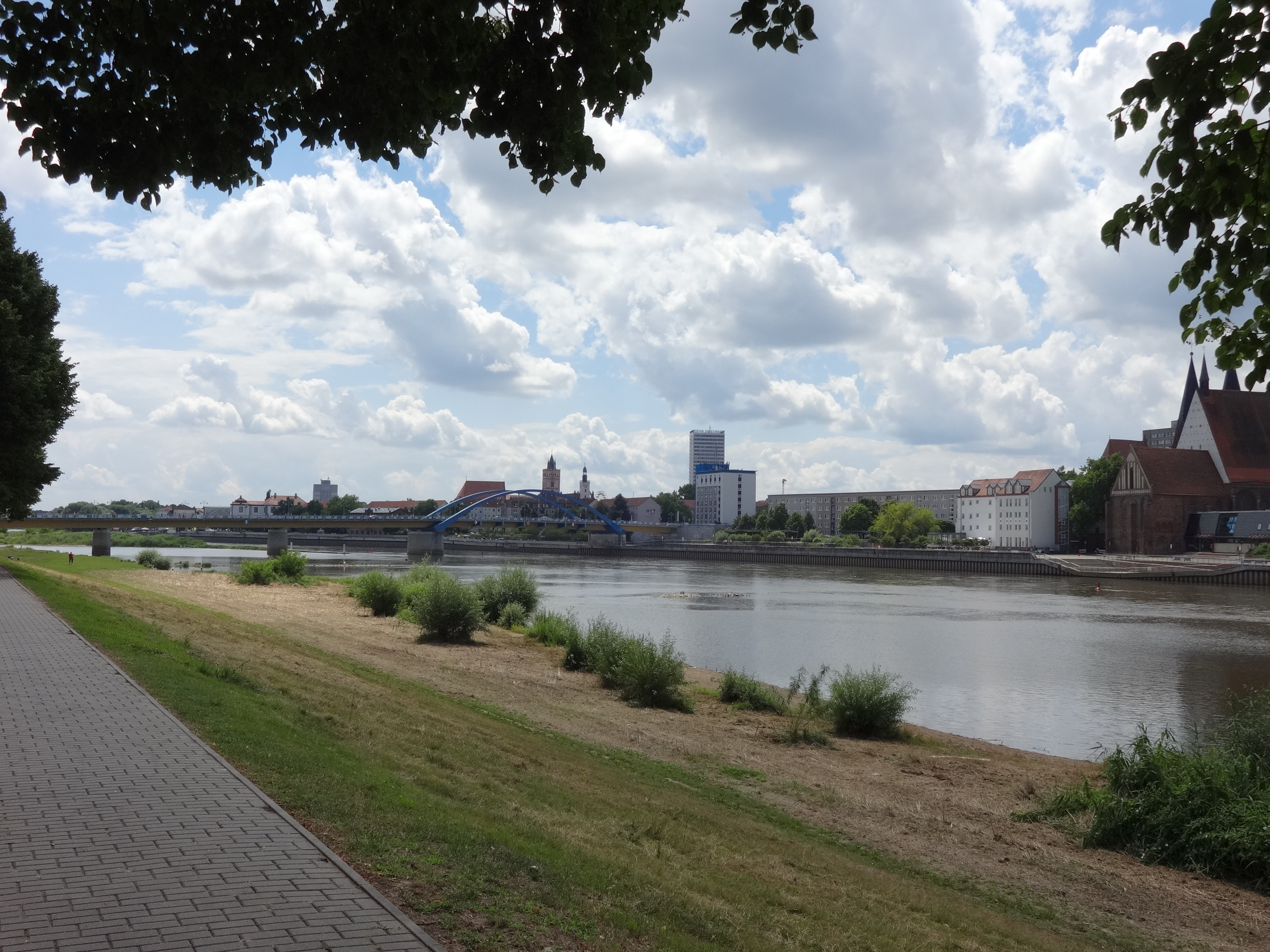 Blick vom polnischen Slubice auf Frankfurt (Oder)